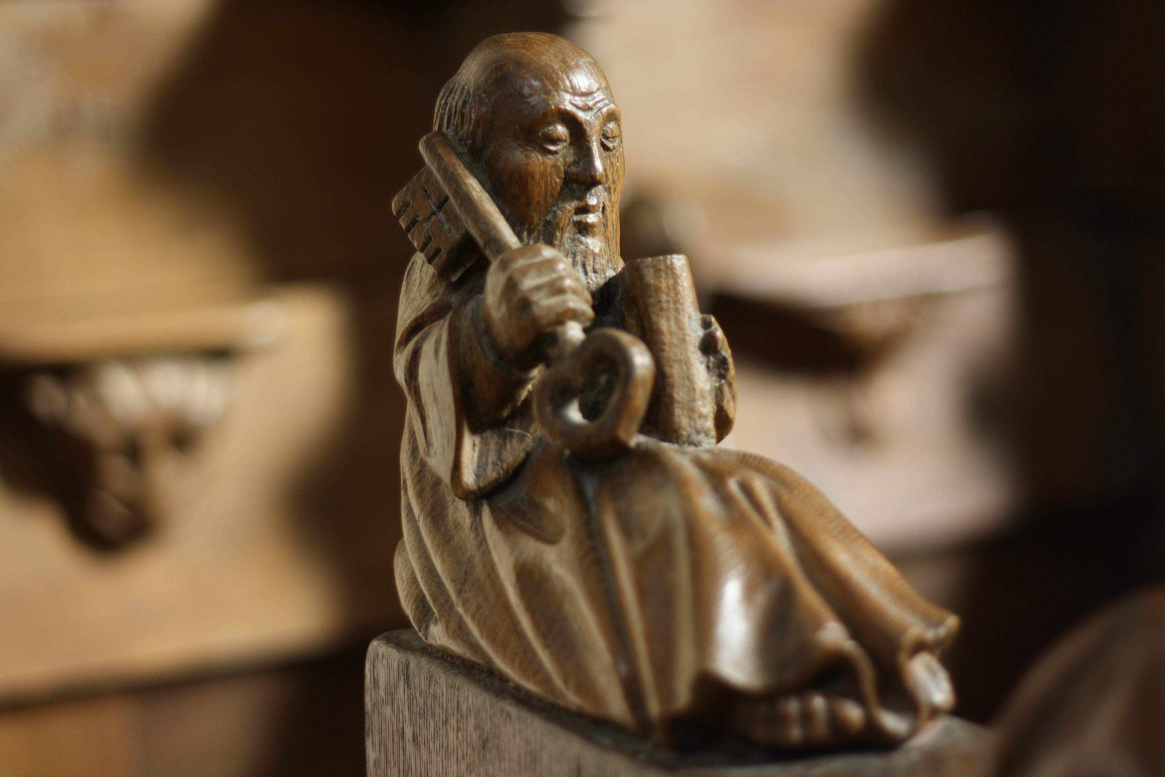 Ehemalige Abteikirche Notre-Dame in Ambronay, einer Gemeinde im Département Ain in der französischen Region Rhône-Alpes, Chorgestühl aus Eiche aus dem 15. Jahrhundert, Darstellung: Apostel Petrus